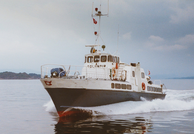 MS Solundir på vei ut Byfjorden i 1988.